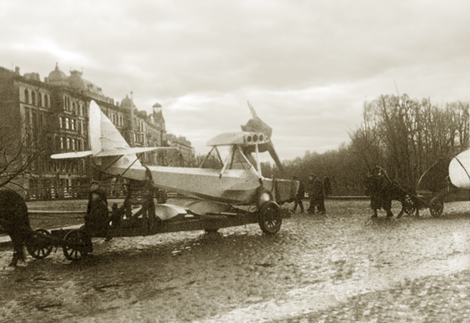 Шавров_перевозит Ш-1 на Комендантский_аэродром (Shavrov Sh-1